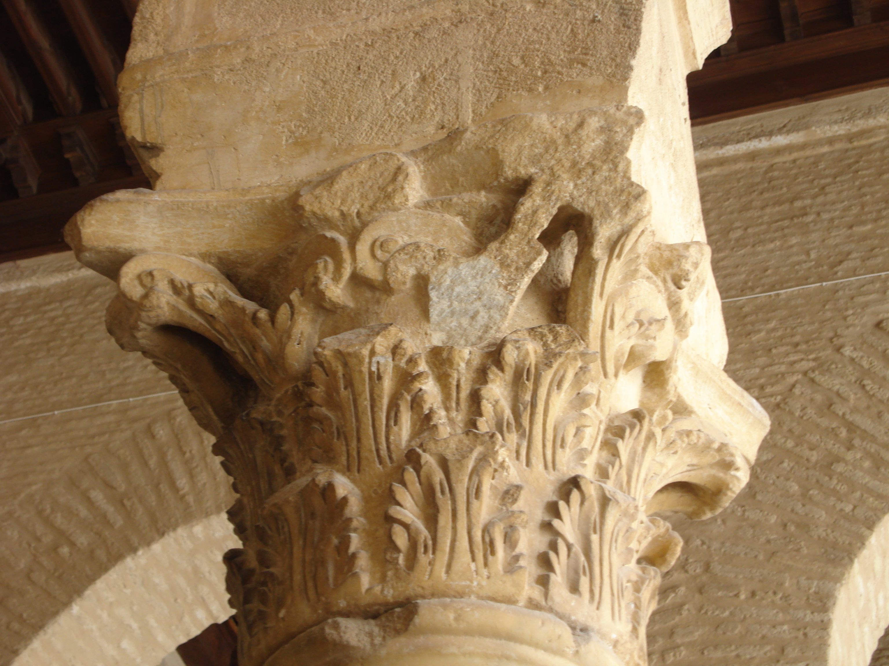 Détail du décor d'une colonne en face de la salle de prière de la Grande mosquée de Kairouan (Tunisie)